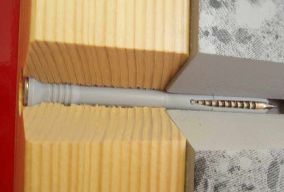 Fischer F dübel